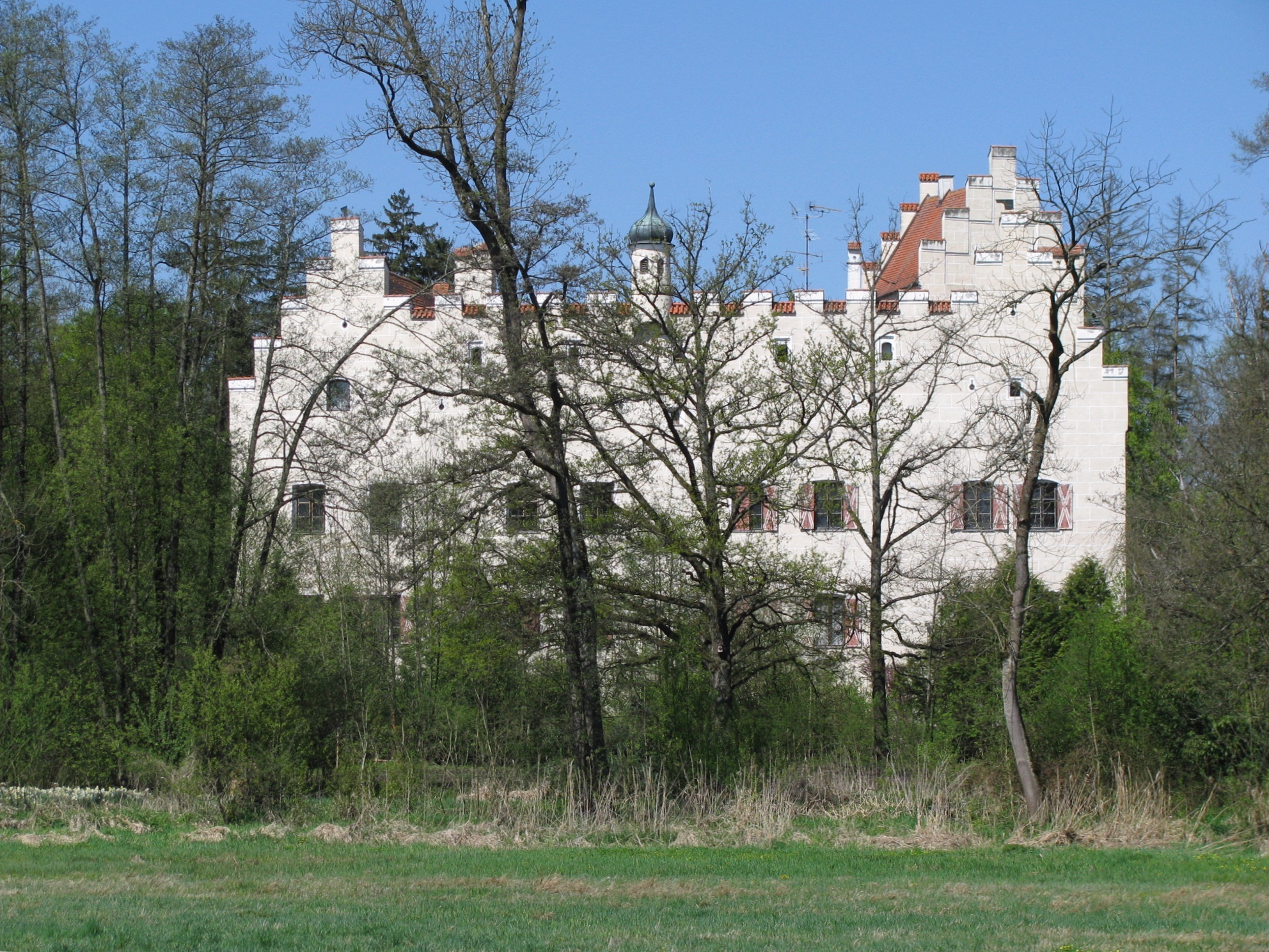 Schloss Reichertshausen im oberbayerischen Reichertshausen, Landkreis Pfaffenhofen an der Ilm, Ansicht von Osten